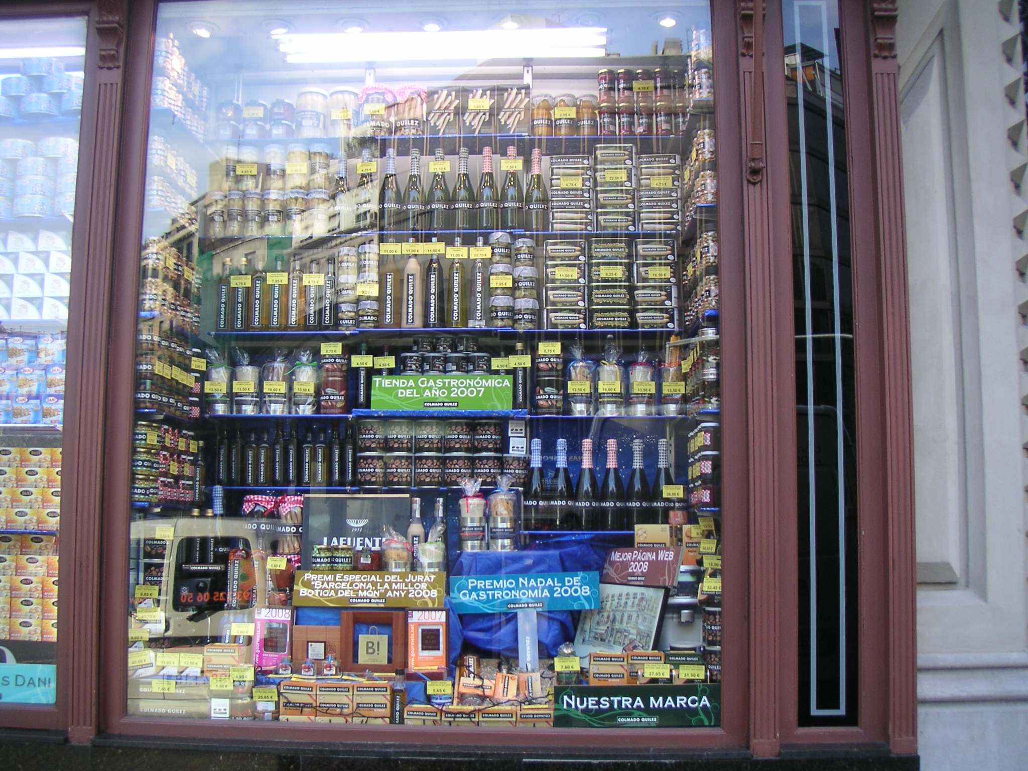 Detall d'un tros d'aparador d'un colmado modern (decembre 2008). En aquest en particular les etiquetes no són ja les característiques, sinó que les han substituit per d'altres en groc clar, d'igual mida i mecanografiades. Les tradicionals, que encara es fan servir en alguns comerços, són de mides diferents, en groc canari i estan escrites a mà amb rotuladors gruixuts, totes tenen alguna cosa vermella i alguna negra i tant els noms com els preus són de grans dimensions -i diferentes a cada etiqueta- intentant aprofitar tot l'espai del paper.